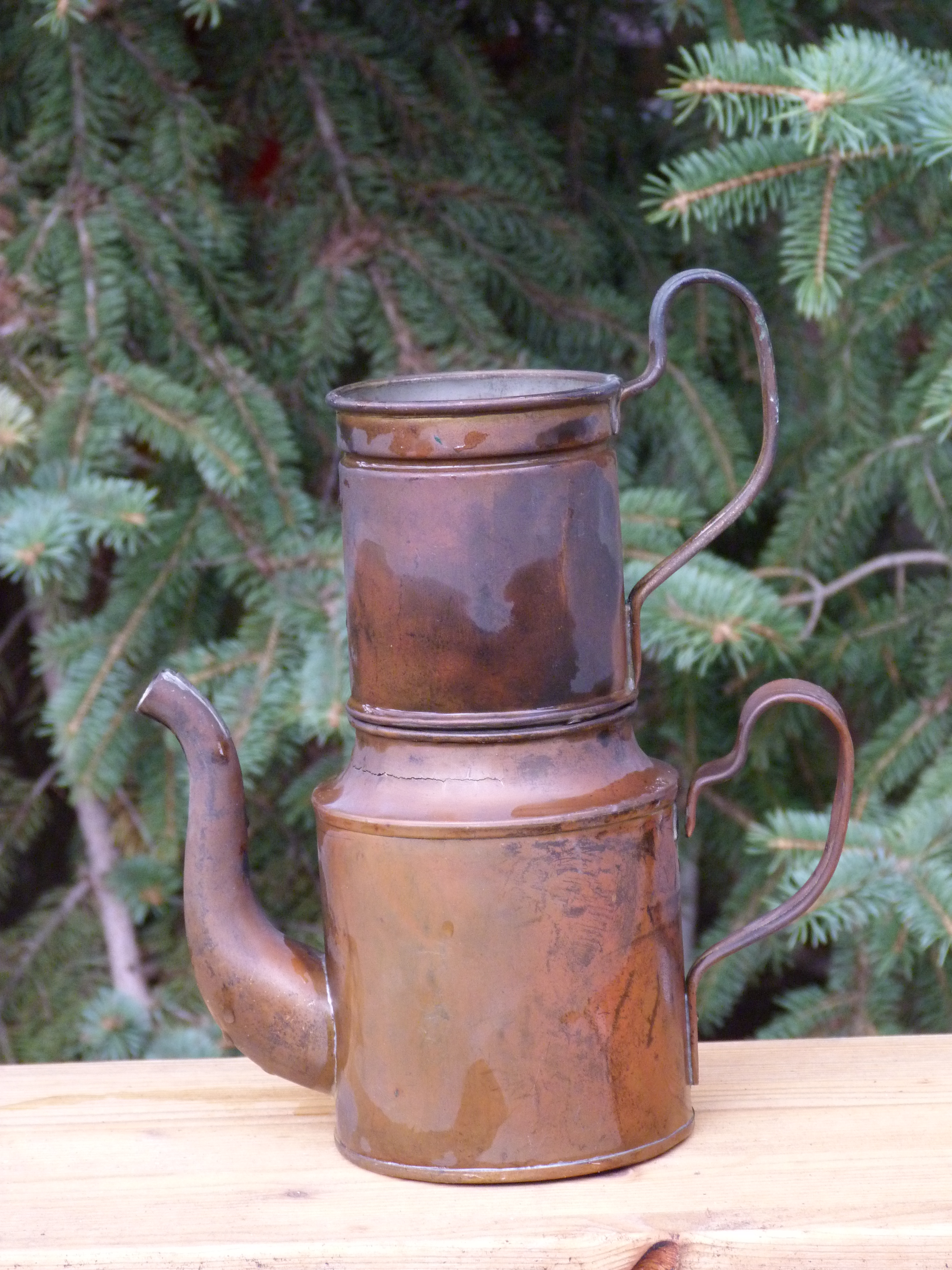 A felvétel 2014. február 23 -án készült. Teáskancsó.